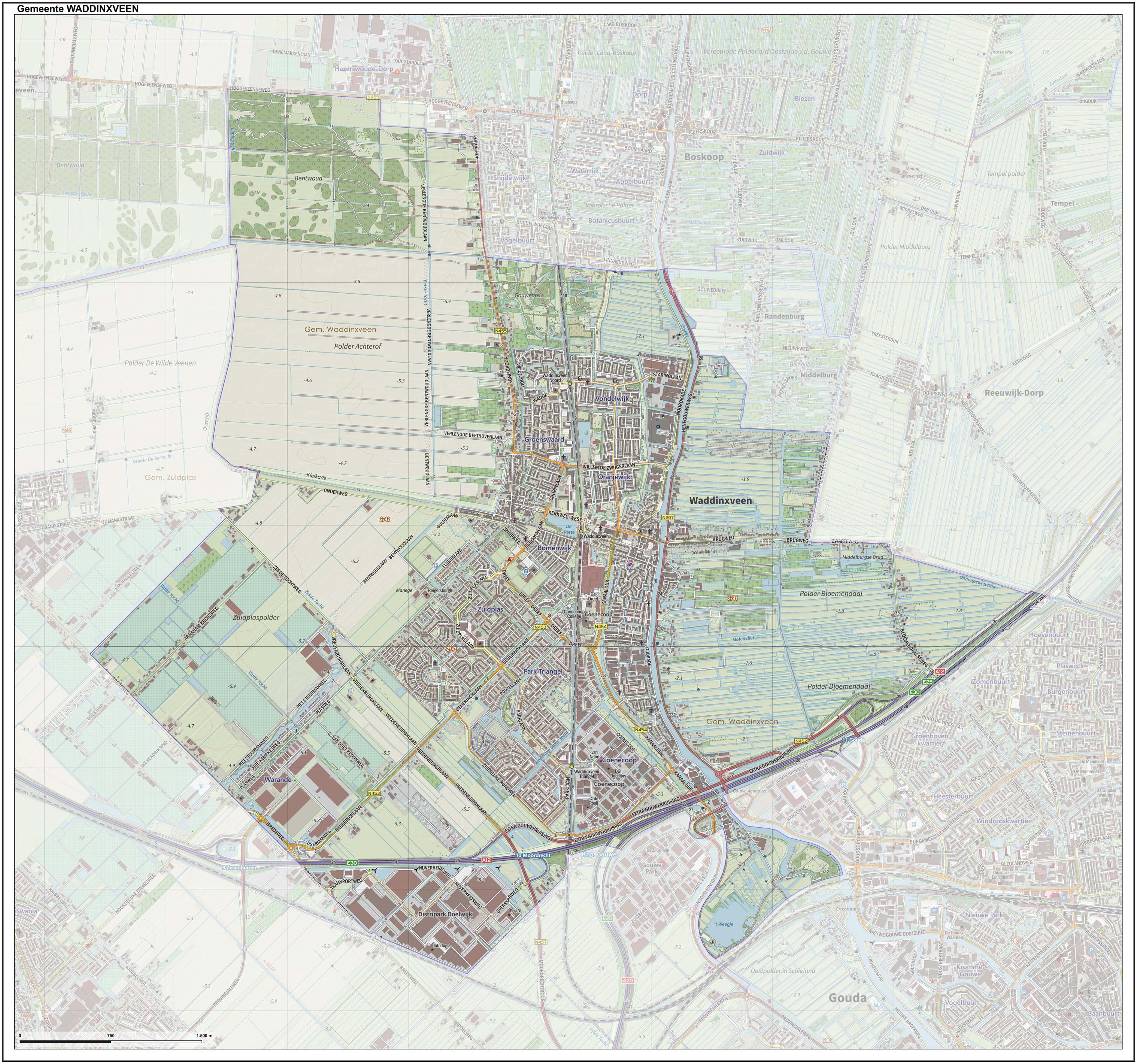 Topografische gemeentekaart. Resolutie: 400 pixels/km. Kaartbeeld samengesteld uit de open geodata van de Top10NL en Top25namen (Kadaster), Creative Commons-BY licentie. Gebouwvlakken uit open geodata BAG extract. Wegen uit de OpenStreetMap, OpenStreetMap community. Reliëfschaduw uit de Actuele Hoogtekaart AHN2. Samenstelling en kleurenschema: Jan-Willem van Aalst, met QGIS. Zie ook de Legenda.